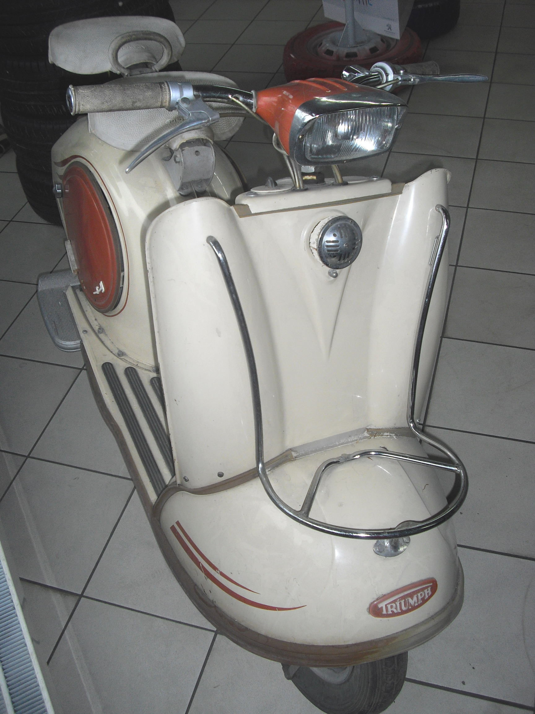 Motorroller Triumph "Tessy"